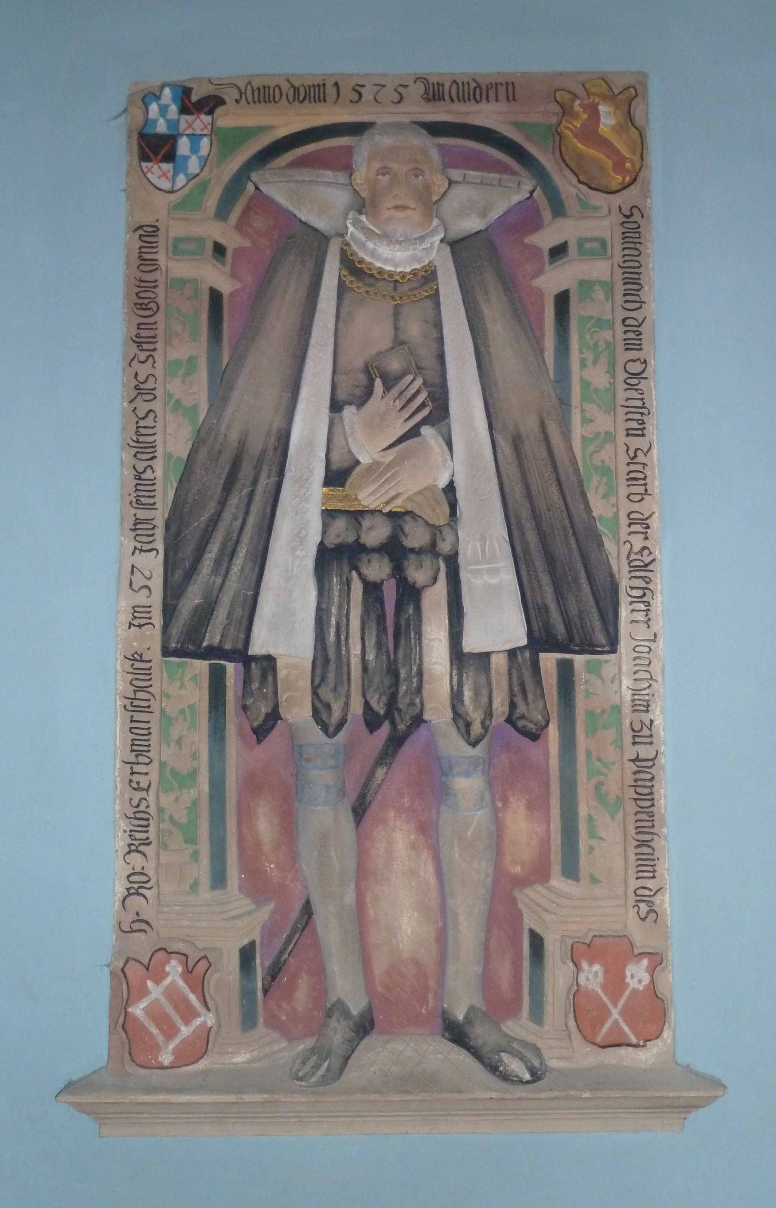 Grabplatte des Joachim von Pappenheim († 1575) in der Stadtkirche Gräfenthal